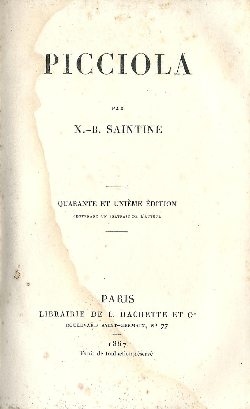 Page de titre du livre "Picciola par X.B. Saintine, 41e édition, Hachette, 1867".